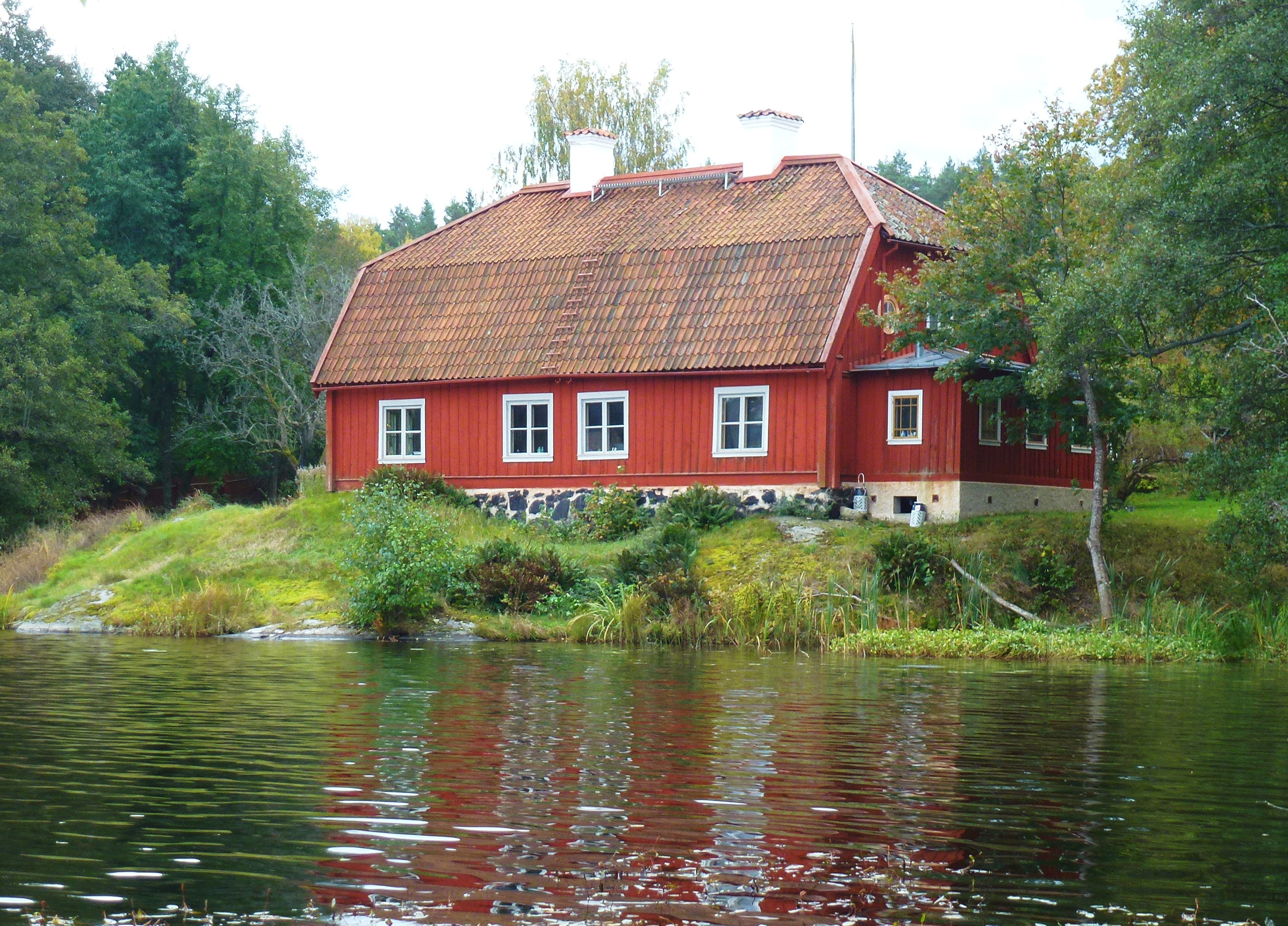 Torpet Källtorp vid Källtorpssjön i Nacka kommun